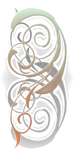 Arabesken